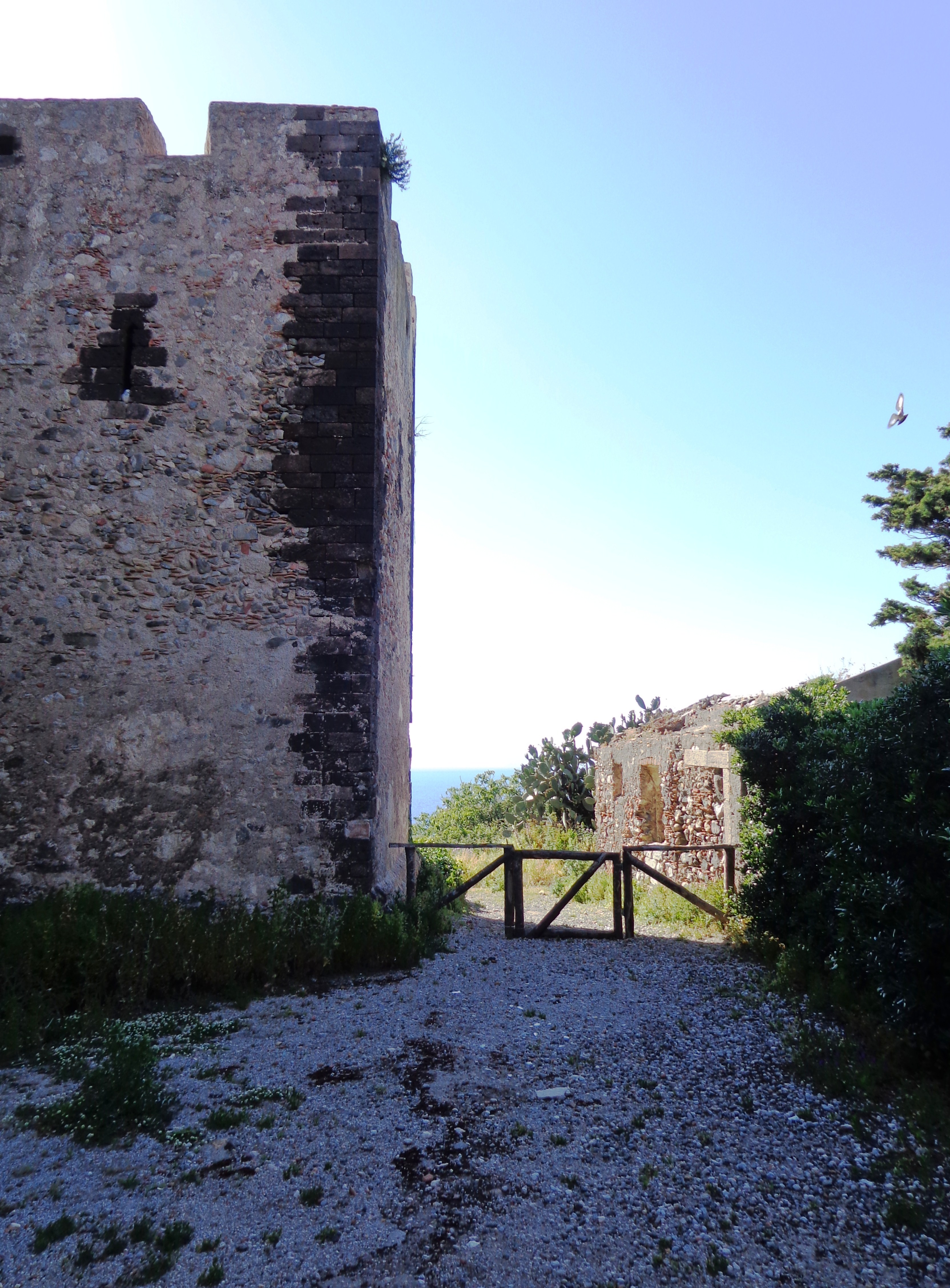 Facciata Duomo